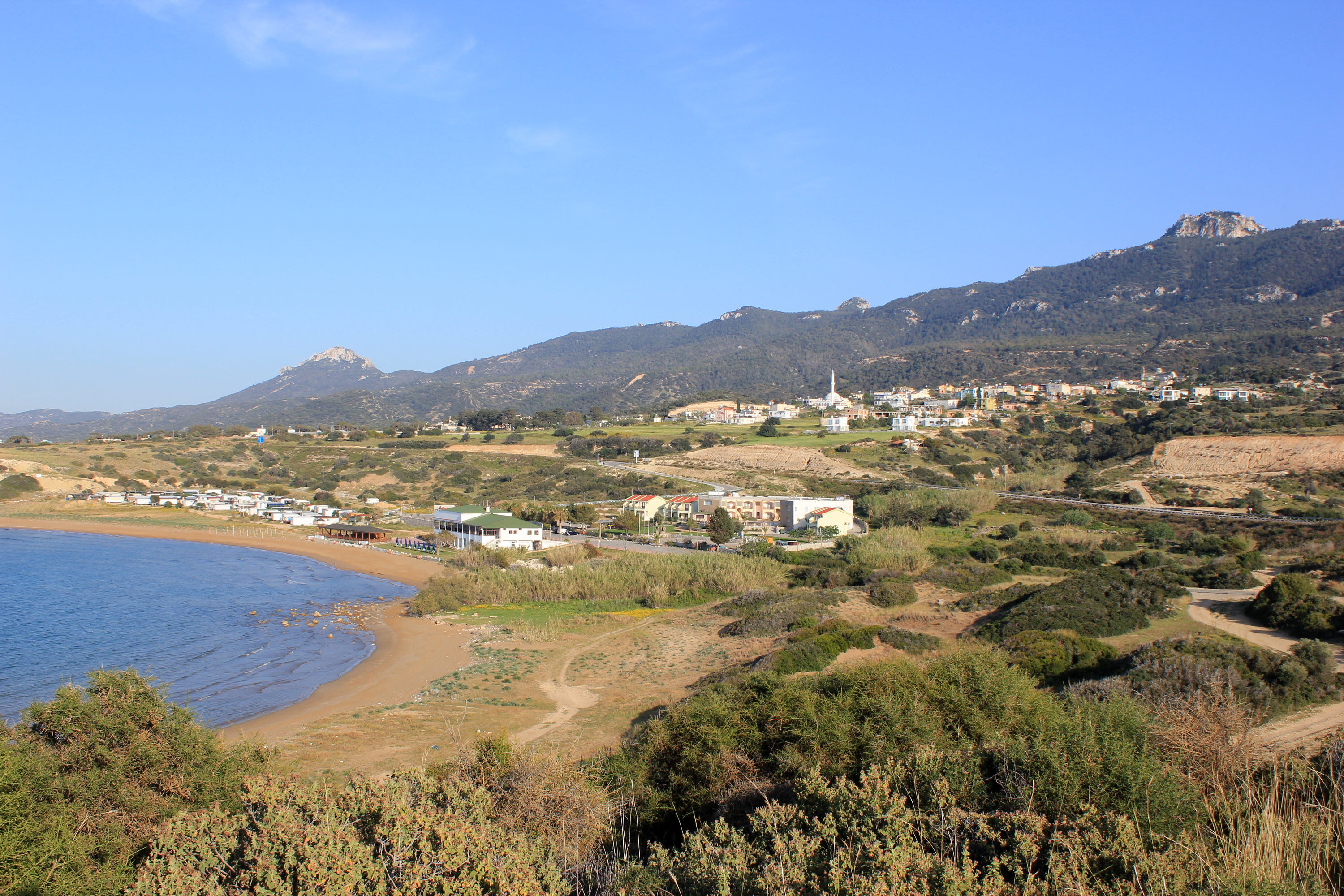 Blick auf den Ort Kaplica (Davlos) an der Nordküste der Karpas-Halbinsel, Zypern.